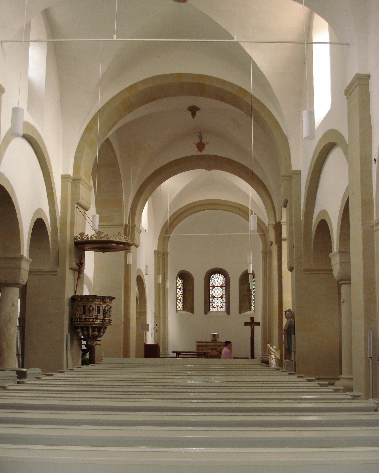 Heiningen, ehem. Klosterkirche St. Peter und Paul, Inneres